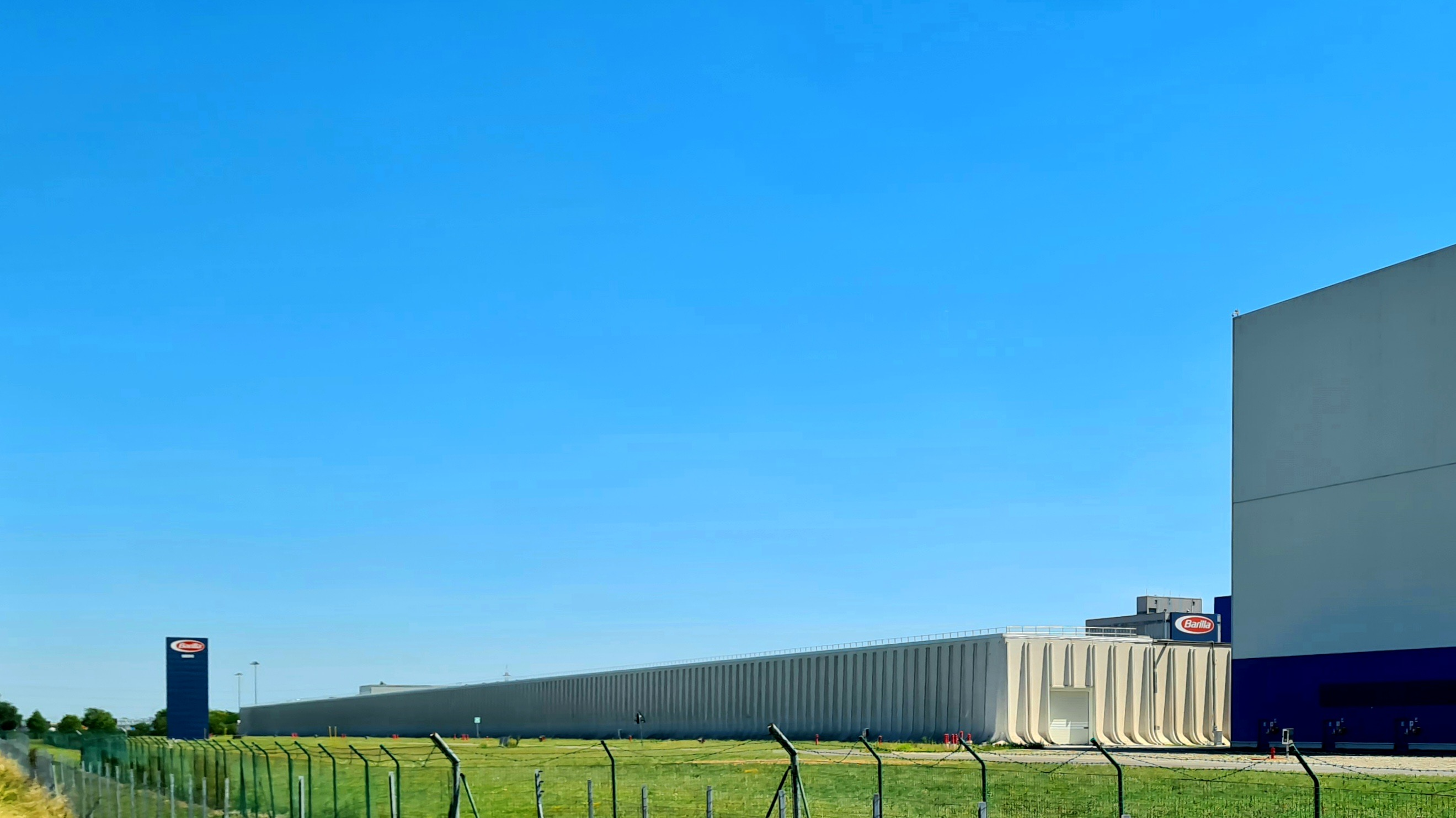 Sede centrale Barilla a Parma